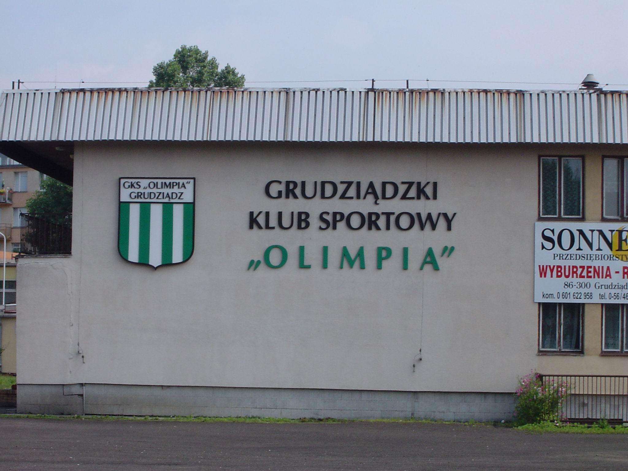 Siedziba GKS "Olimpia" Grudziądz